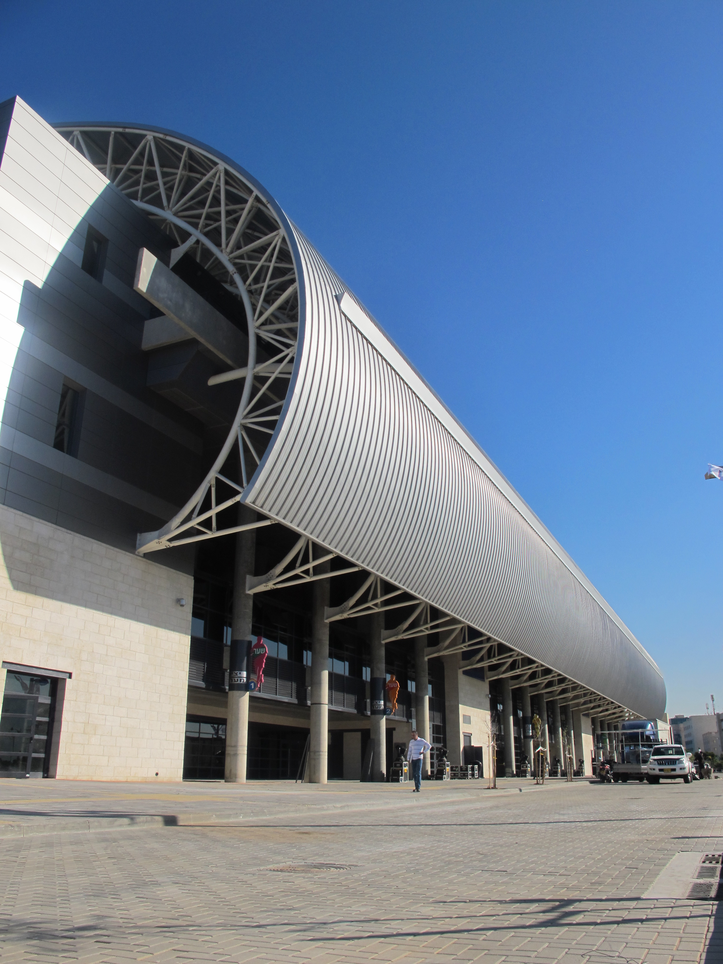 אצטדיון המושבה